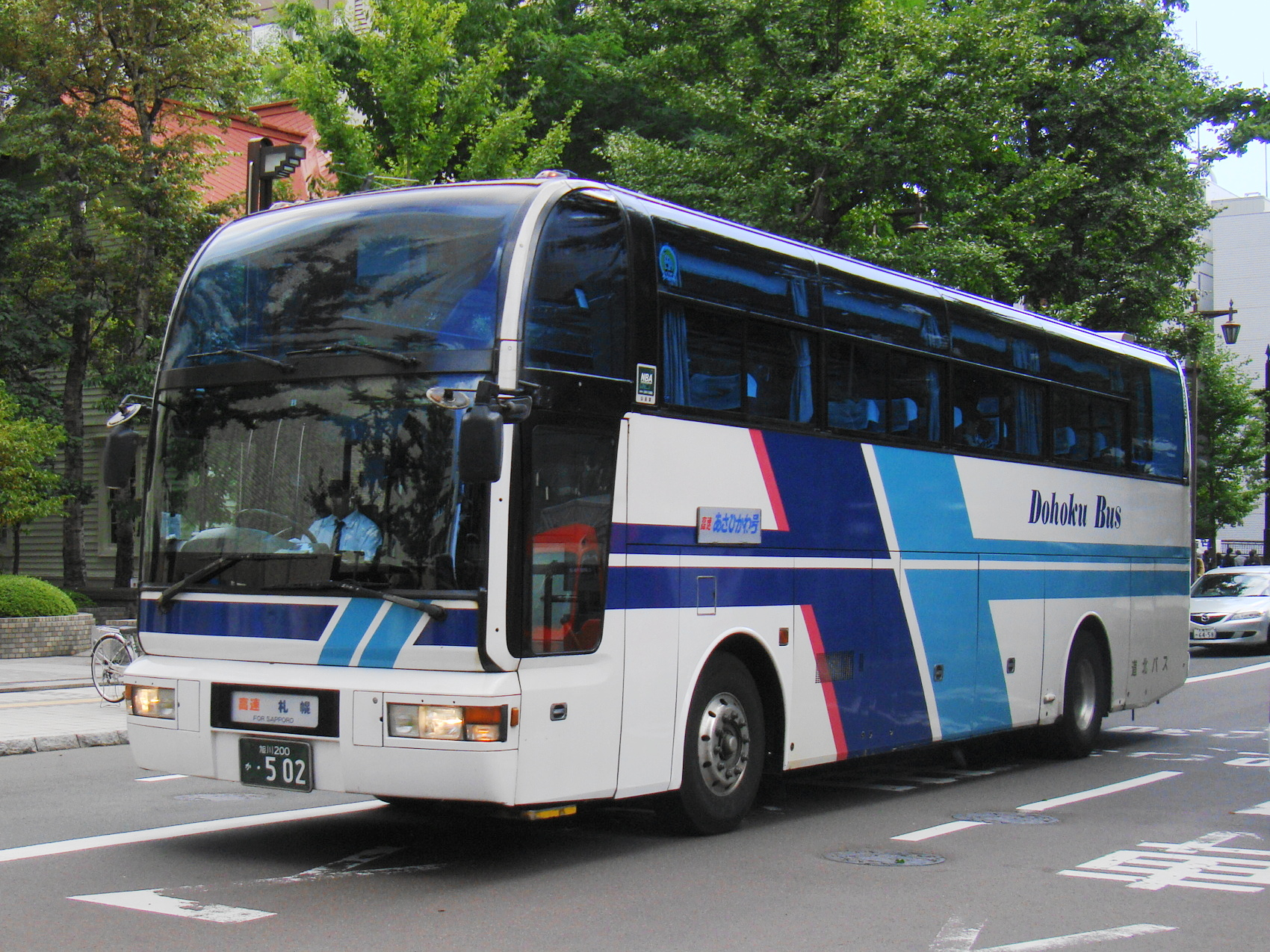 "Kōsoku Asahikawa gō" Asahikawa to Sapporo